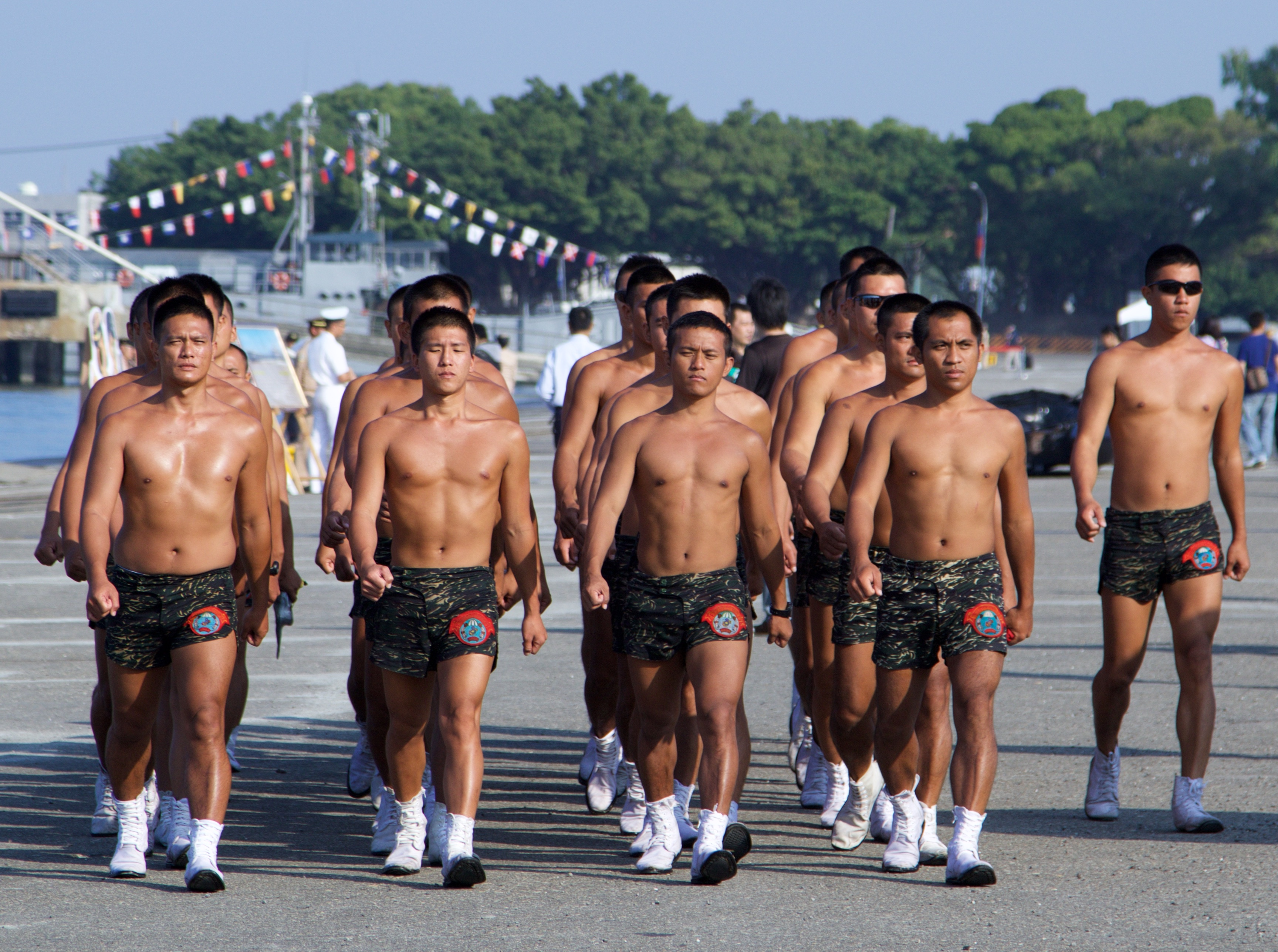 2014年左營軍港營區開放活動，海軍陸戰隊兩棲偵搜大隊行進中。